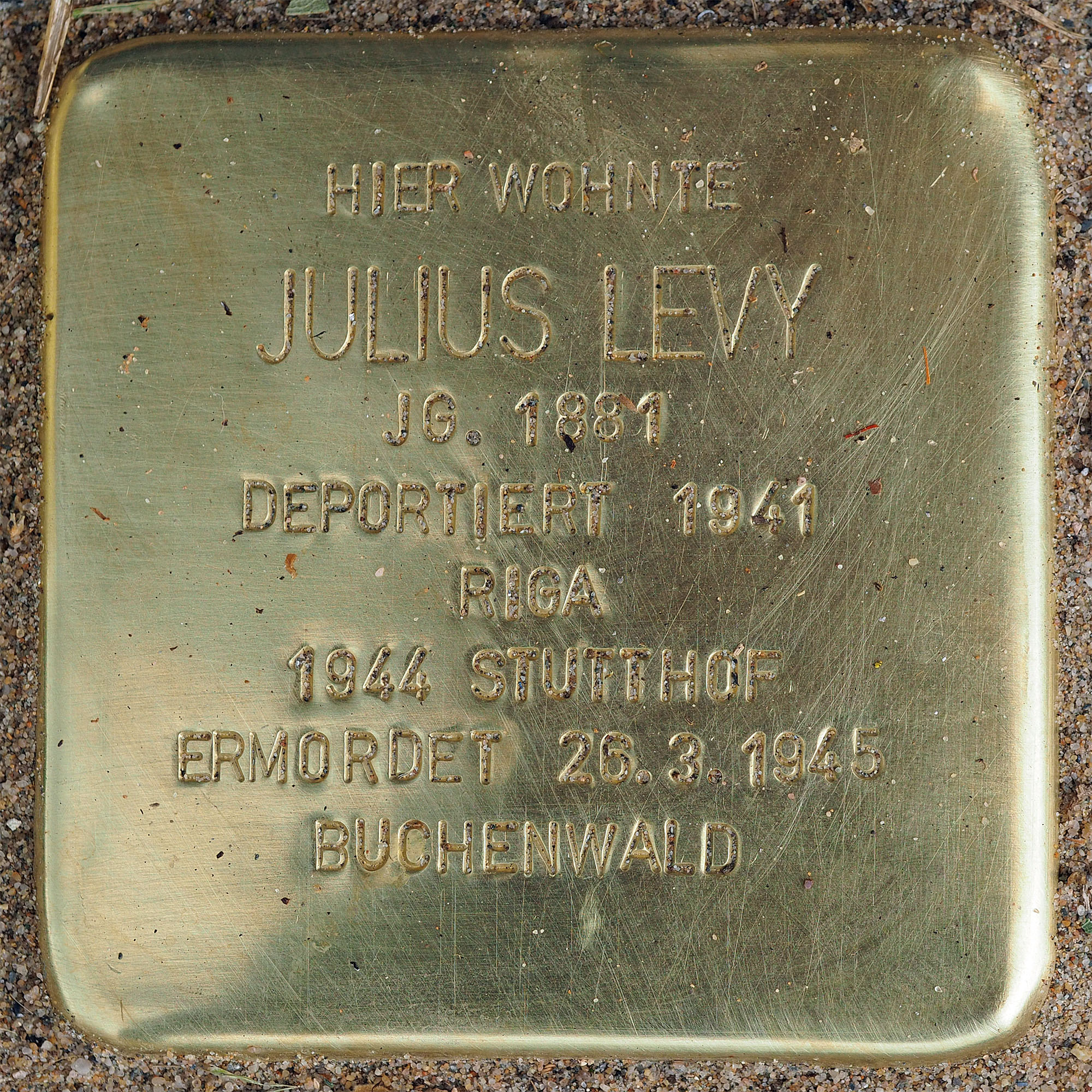 Stolpersteine Suechteln: Levy, Julius